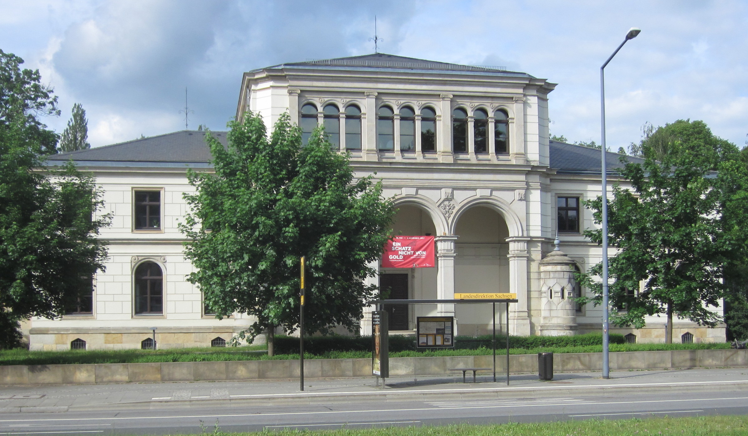 Kulturdenkmal Stauffenbergallee 2a in Dresden. Ehemaliges Wachgebäude der Grenadierkasernen